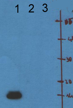 תוצאת ווסטרן בלוט לגילוי החלבון CCL5 בדוגמאות שונות, החלבון מתגלה רק בדוגמה 1 ויוצר בנד בגודל 14 kDa.